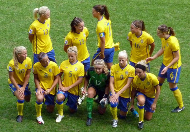 FIFA U-20-Weltmeisterschaft der Frauen, Schwedische Nationalmannschaft, Spiel 20 in Augsburg